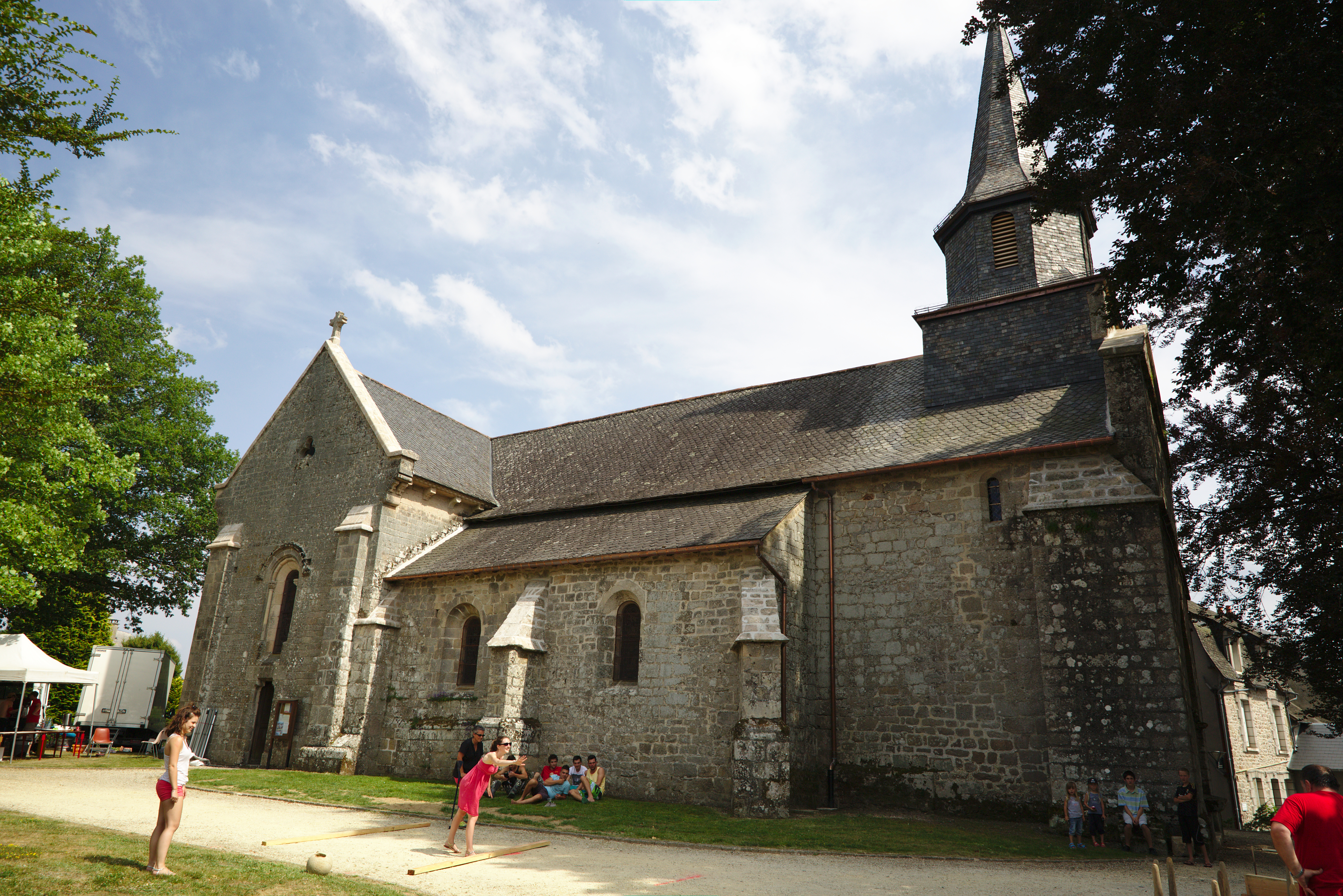 Église Sainte-Croix de Rosiers-d'Égletons